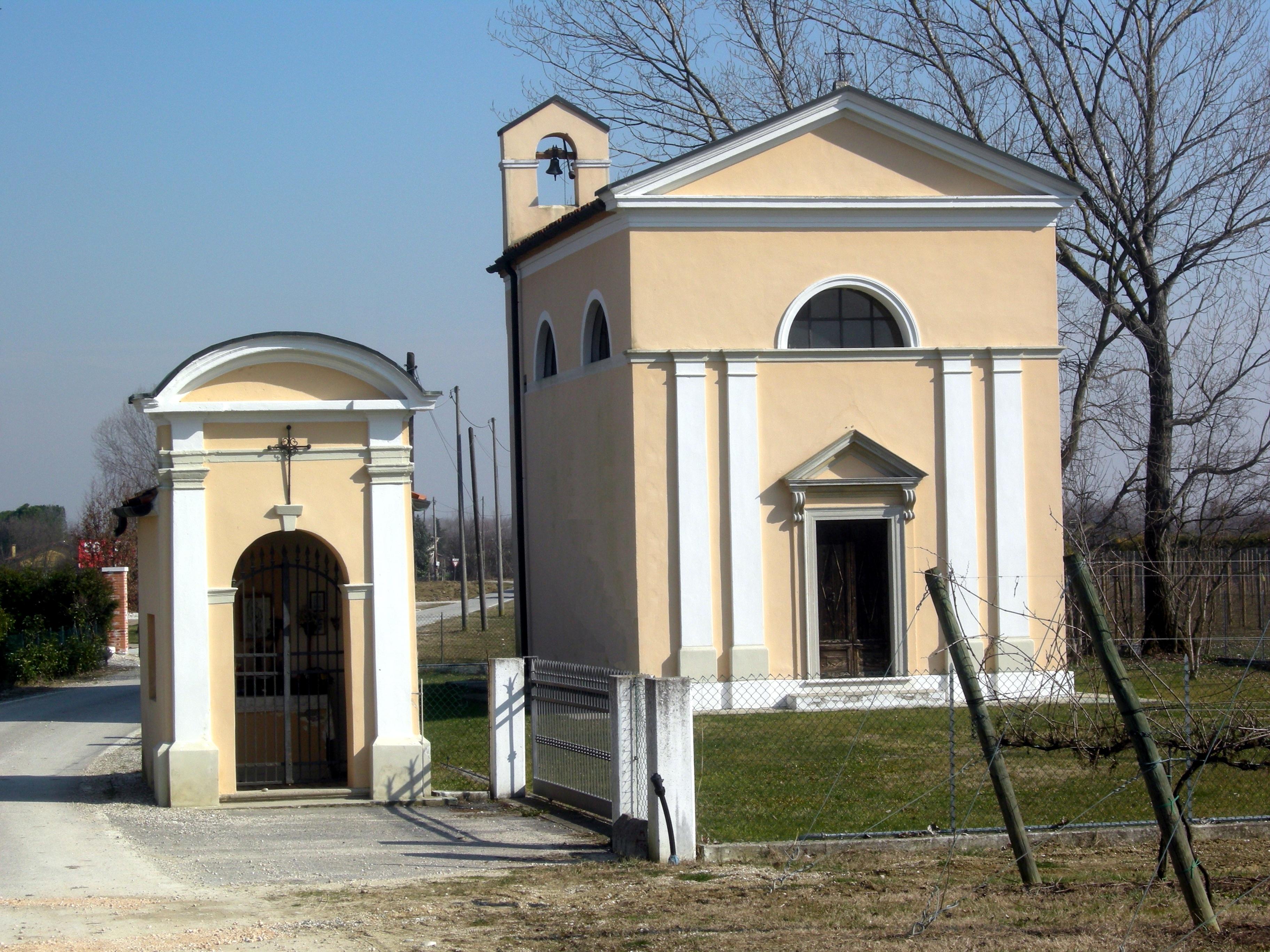 cervellin, opera propria, Oratorio del Beato Enrico da Bolzano, lic. GFDL, data feb. 2009